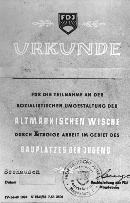 Ehrenurkunde der FDJ Zentralbild Repro 3.9.1958 Auszeichnung für die Teilnahme an der sozialistischen Umgestaltung der Wische. UBz: Das Abzeichen, das zusammen mit einer Urkunde für die Teilnahme an einem 14tägigen Arbeitseinsatz in der altmärkischen Wische von der Bezirksleitung der FDJ Magdeburg herausgegeben wird.